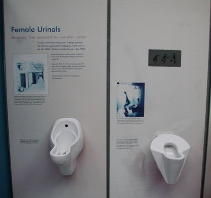 Gladstone Pottery - two designs of female urinal!